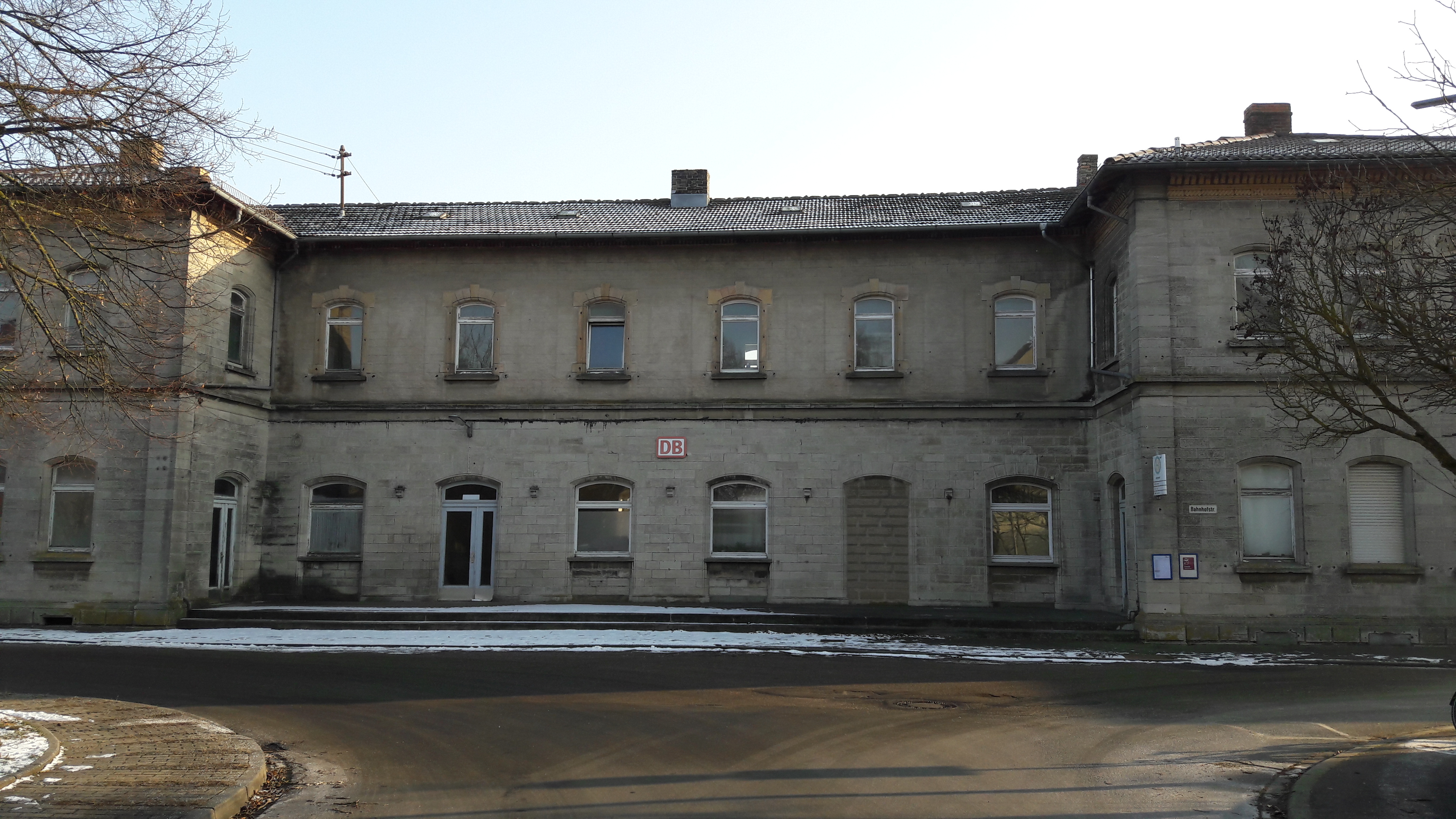 Bahnhofstraße 6 (Unterwittighausen 2017)